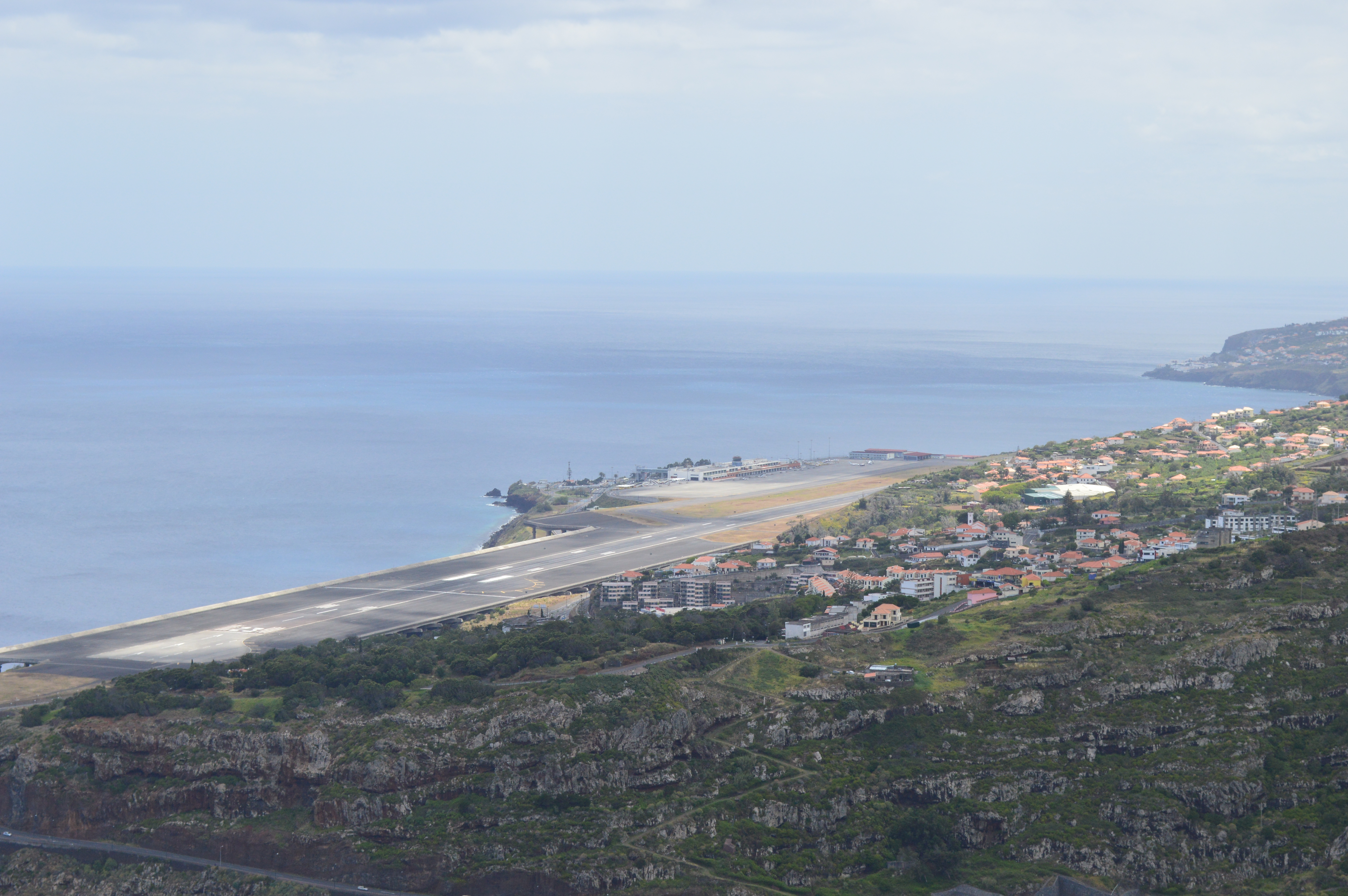 aeroporto do Funchal visto do alto